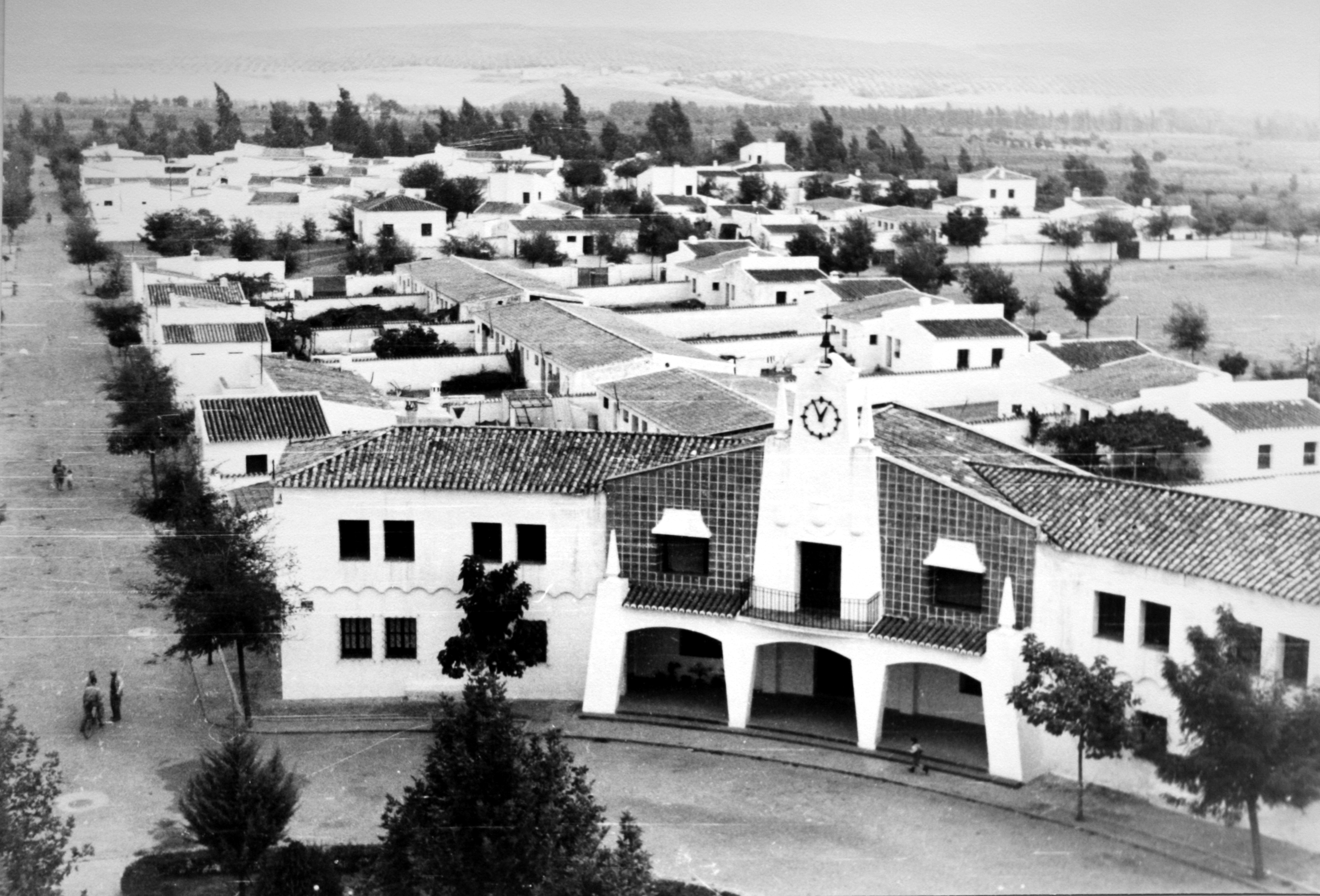 Vista del edificio del ayuntamiento, dispensario y correos